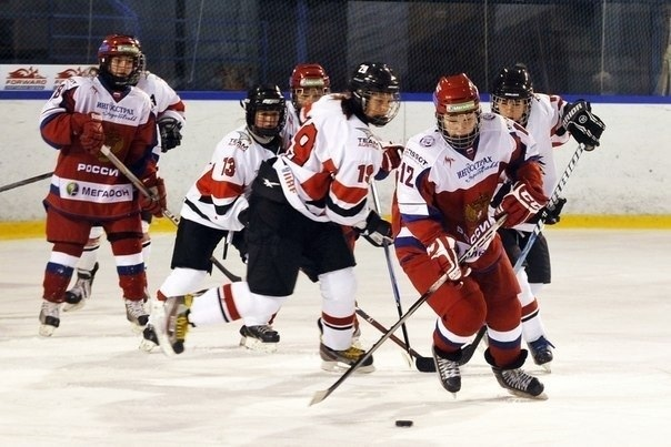 Чемпинат мира 2012 (молодежка)